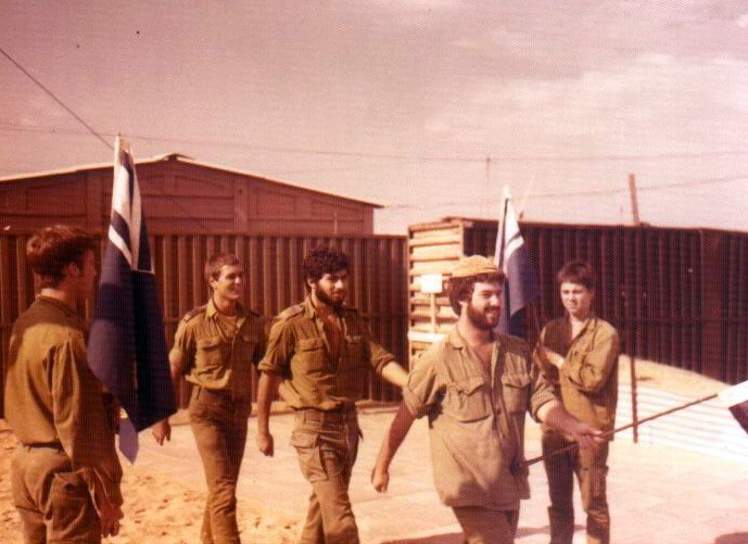 מסדר בבסיס דפנה